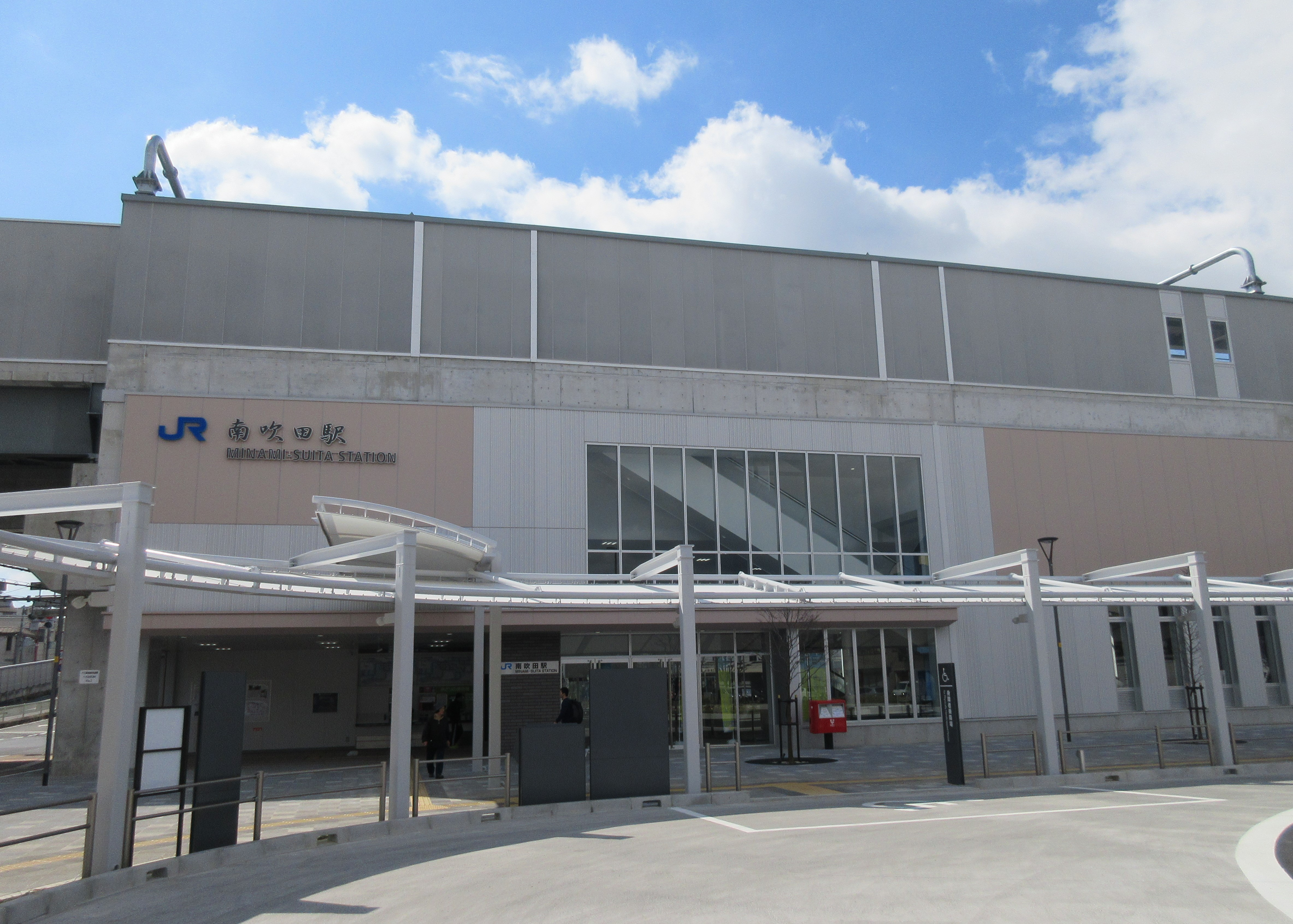 JRおおさか東線南吹田駅